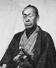 坂本龍馬の兄・権平の写真